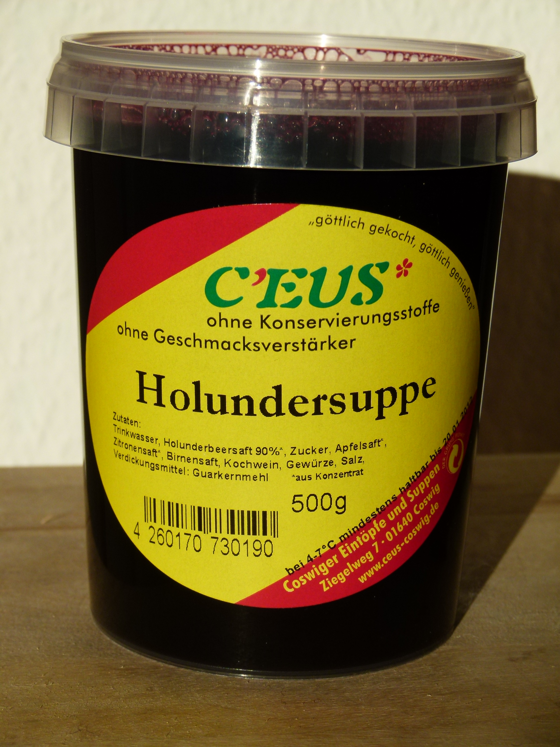 Holundersuppe aus Coswig, Sachsen